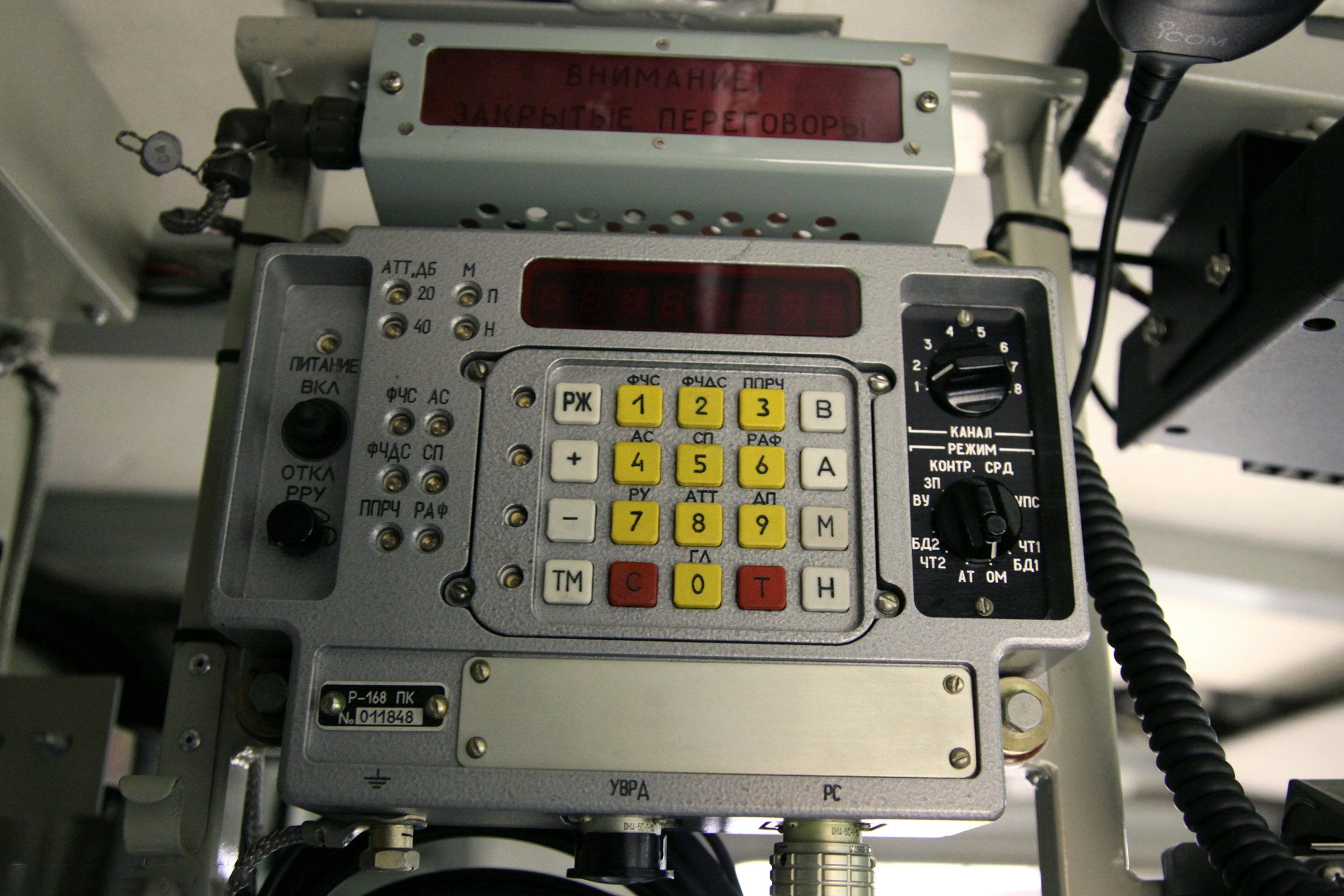 Контрольная панель радиостанции Р-168 (R-168 radiostation control panel)